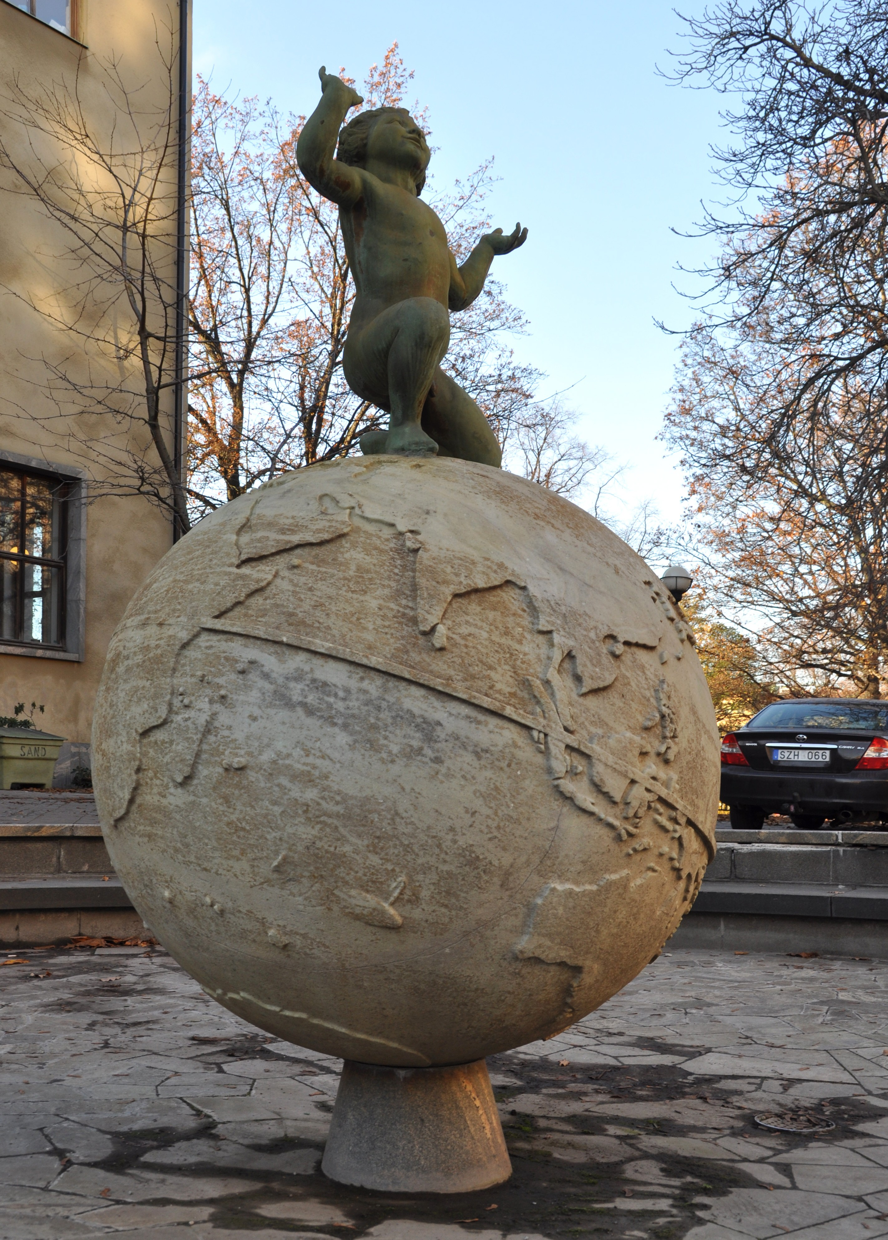 Eastmanfontänen av Clarence Blum. Rest 1936.